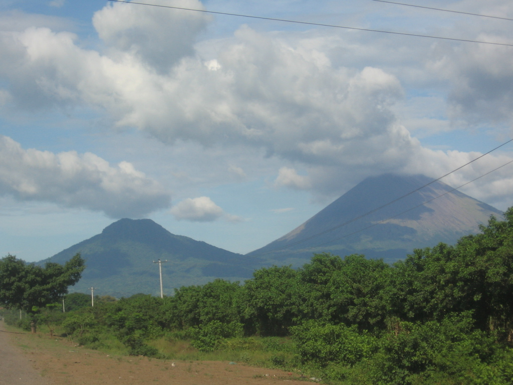 Rotonda los Encuentros